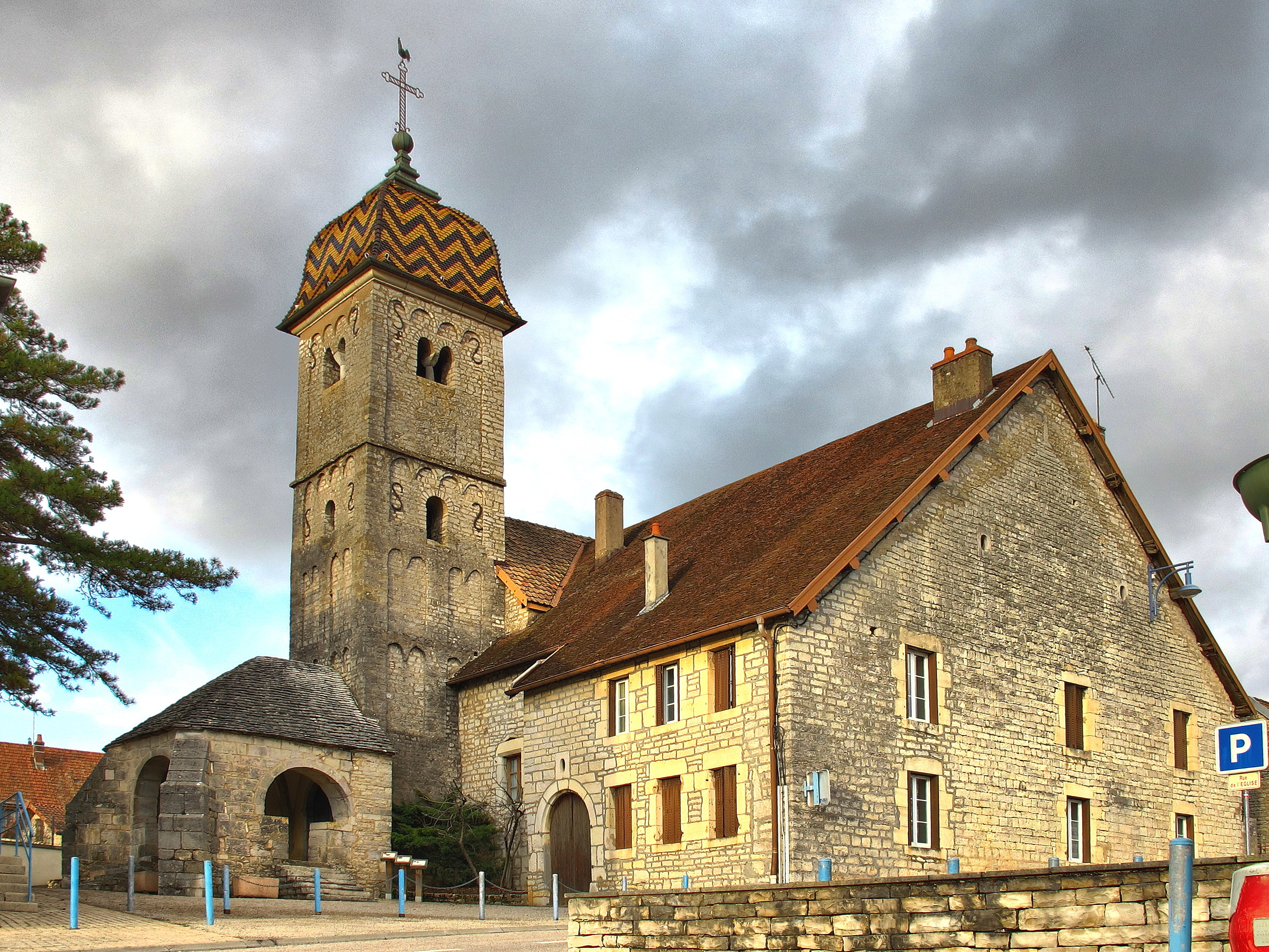 Inscrit aux monuments historiques sous le numéro : PA00101618